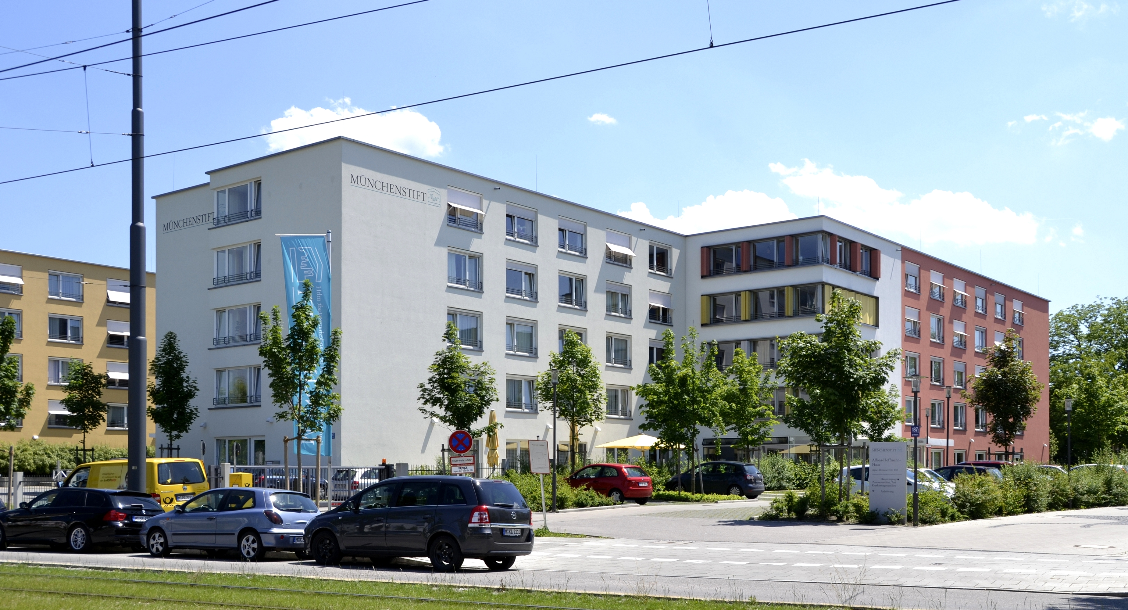 Ein Teil des Neubaus des Alfons-Hoffmann-Altenheims im Münchener Stadtteil Pasing.